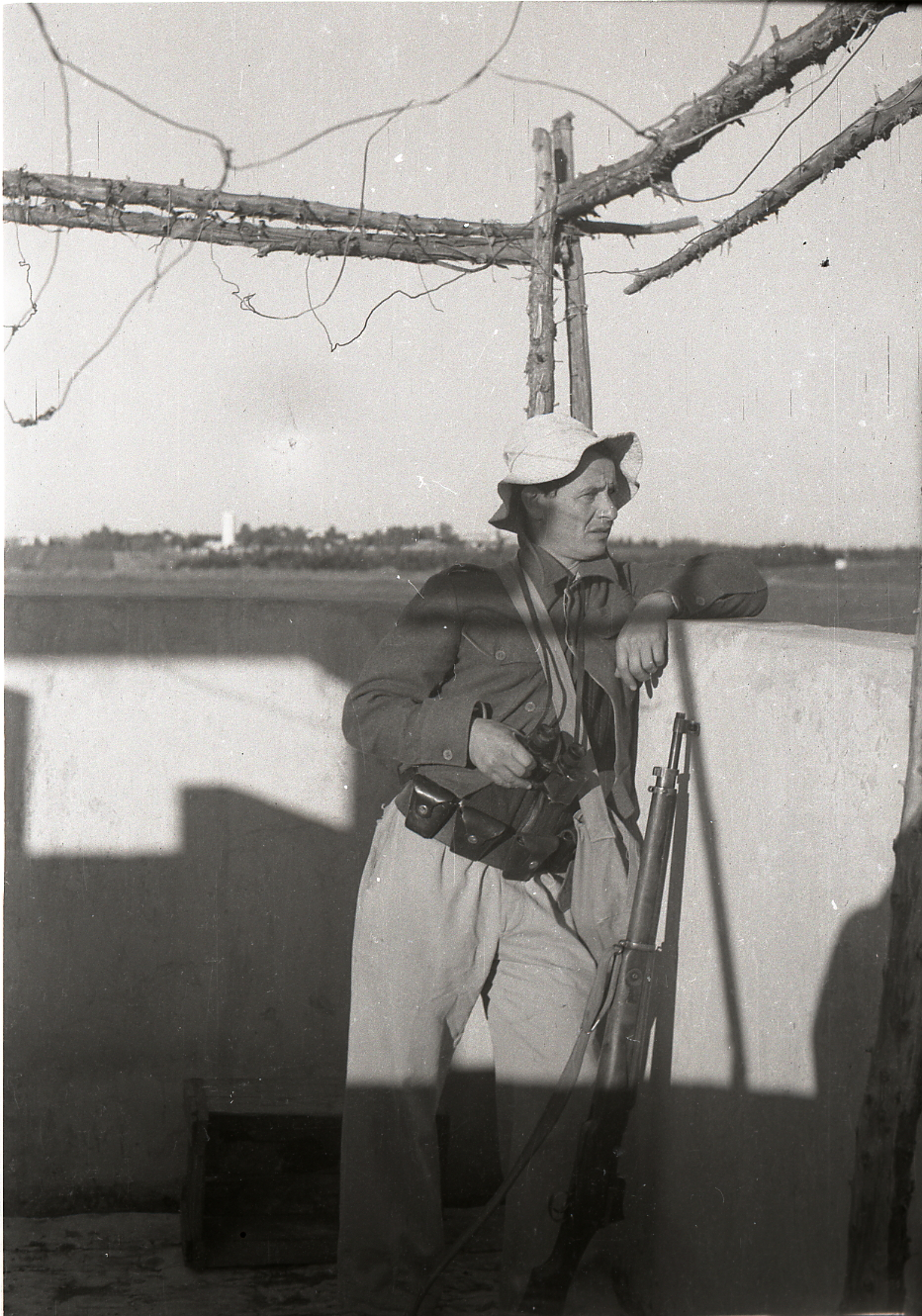 קיבוץ נען עמדת שמירה 1947 צלם בנו רותנברג גנזך המדינה